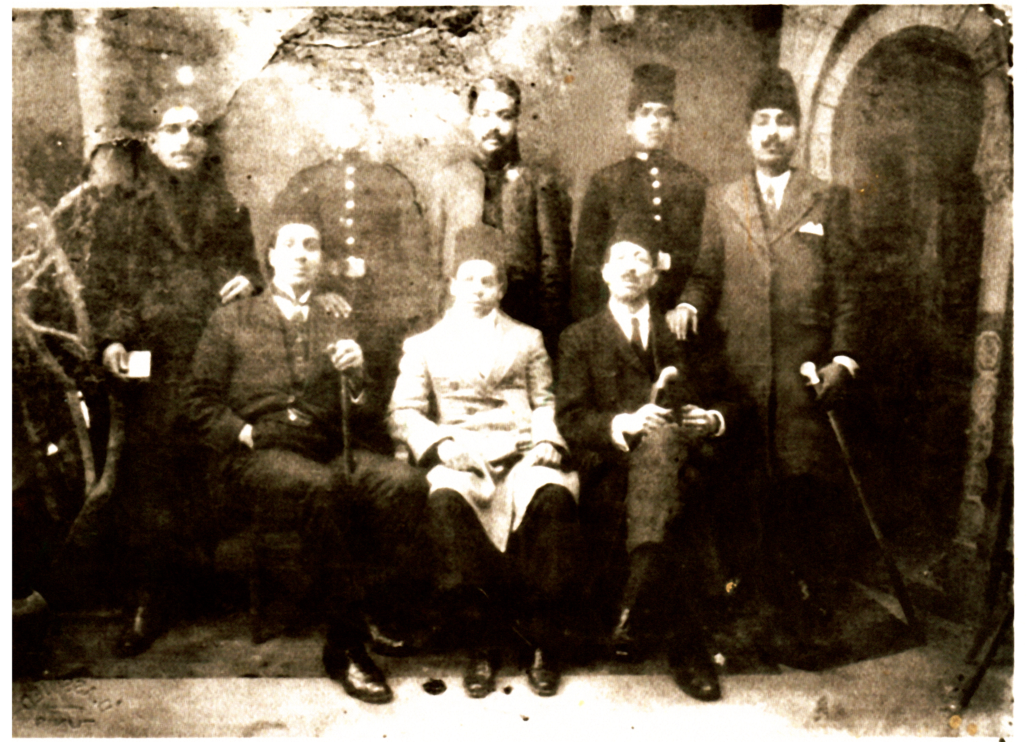 Tunis 1928